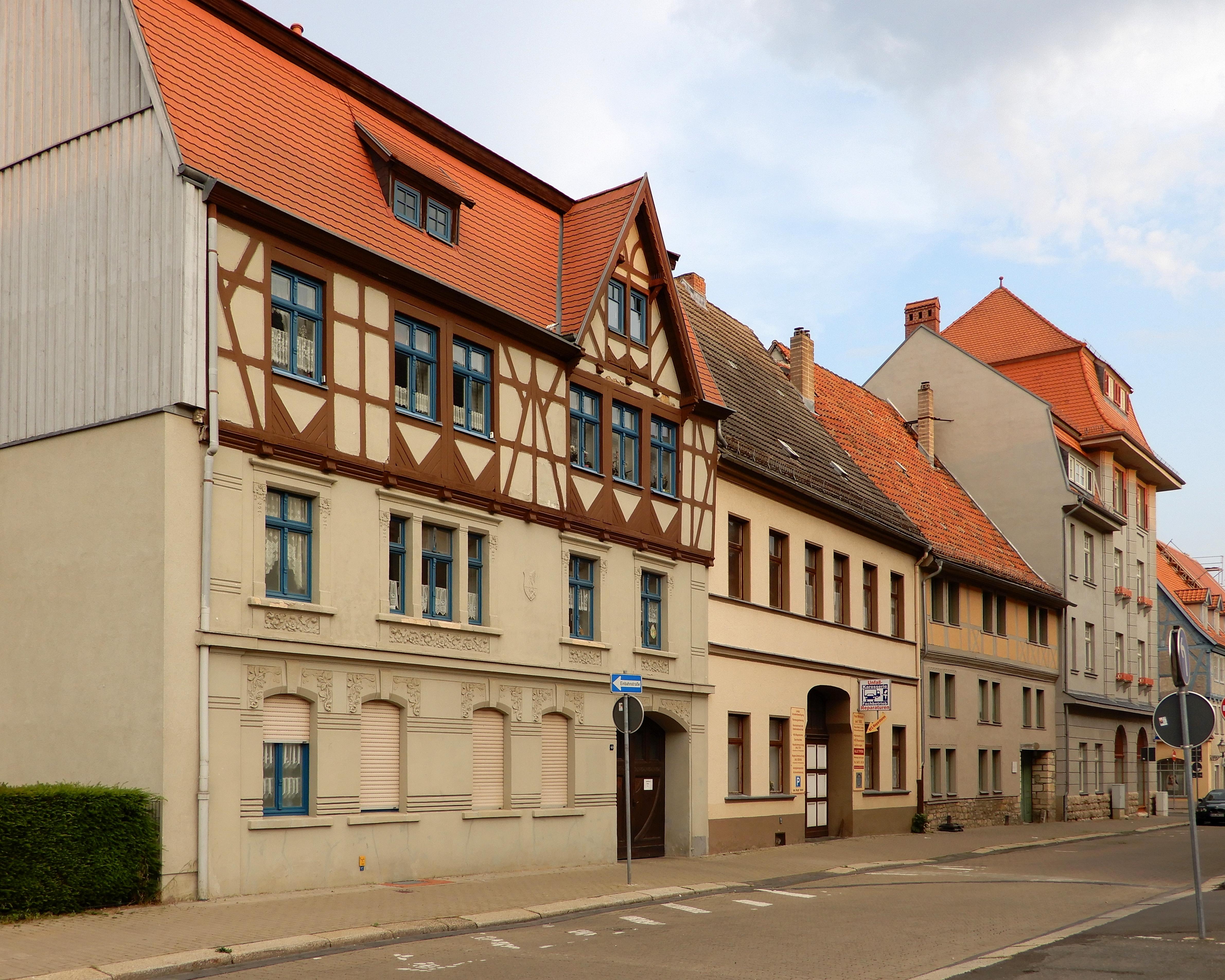 Gebäude Hinterbreite 1-4 in Aschersleben